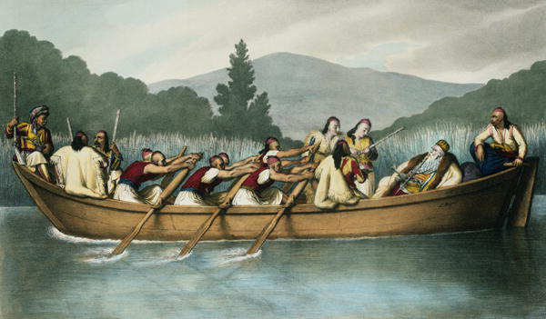 painting